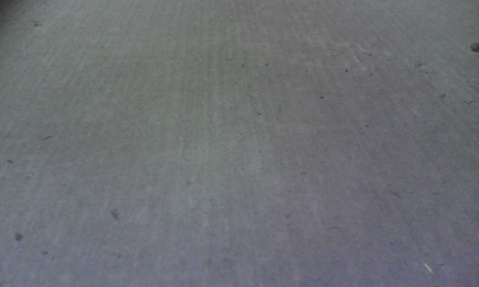 Асбокартон. Россия, Свердловская область. Текстура поверхности листа